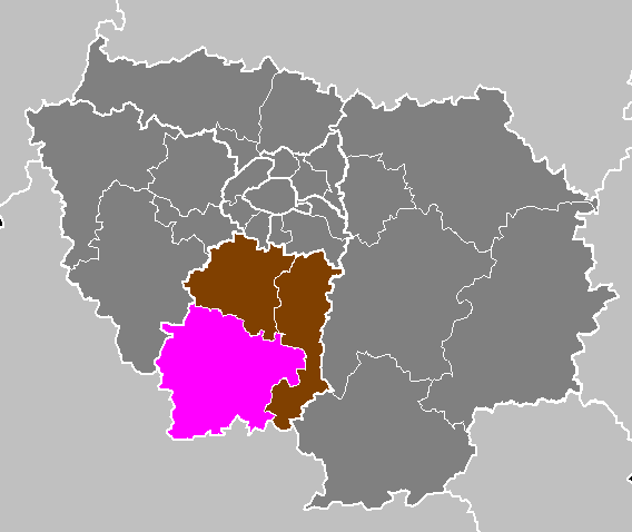 Maps of arrondissements and cantons of France: Département de l Essonne - Arrondissement d Étampes.PNG (Région Île-de-France)